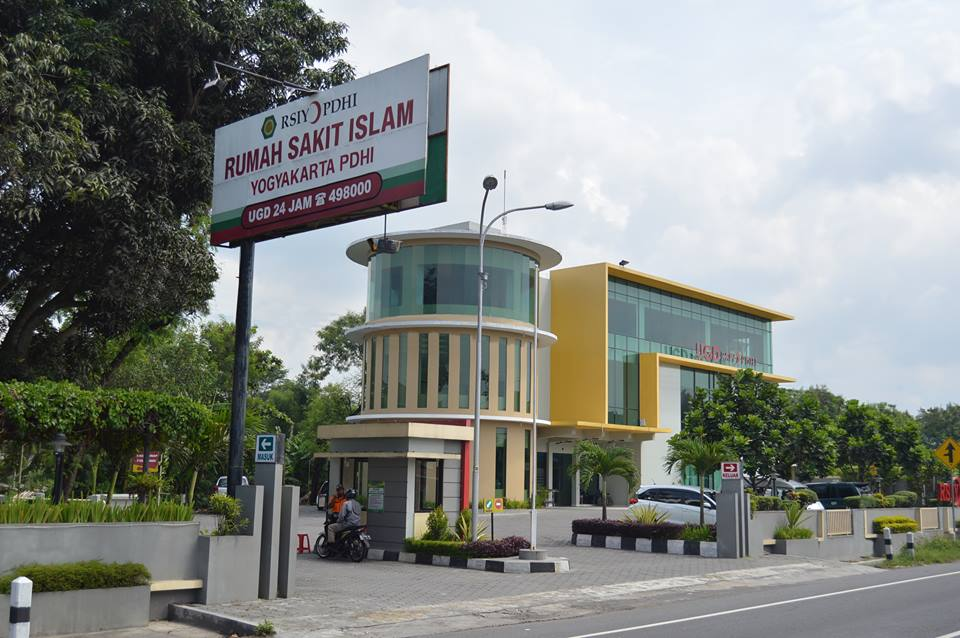 Gedung UGD RSIY PDHI